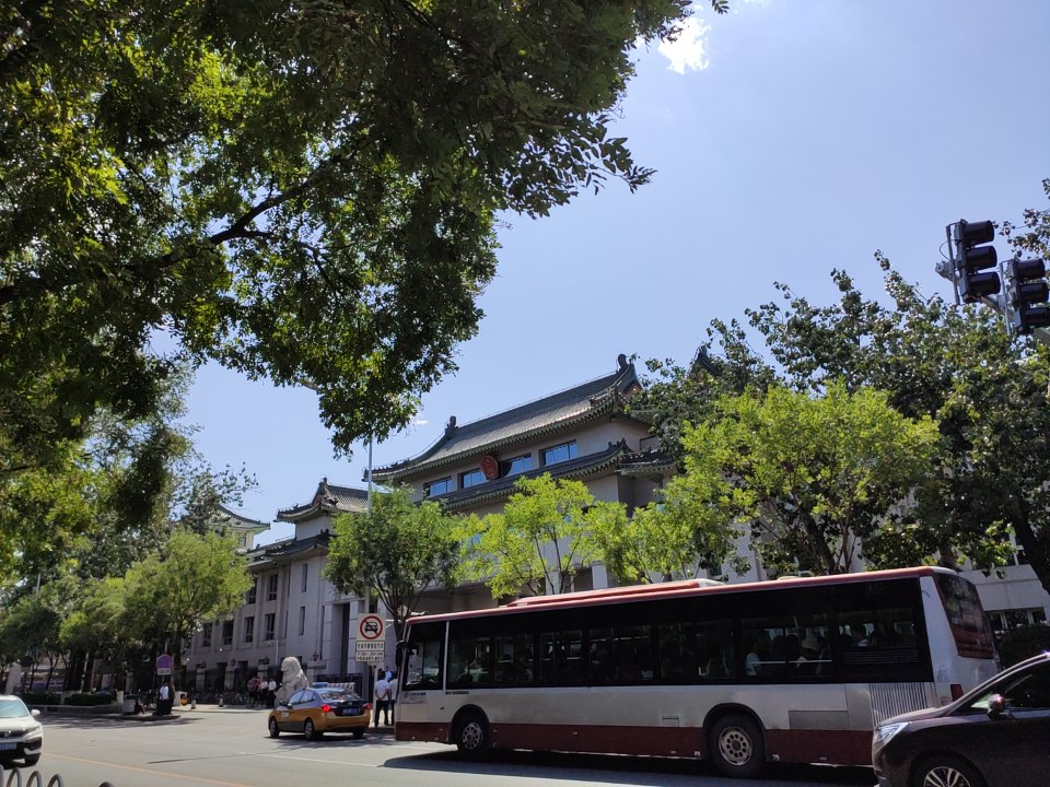 最高人民检察院大门